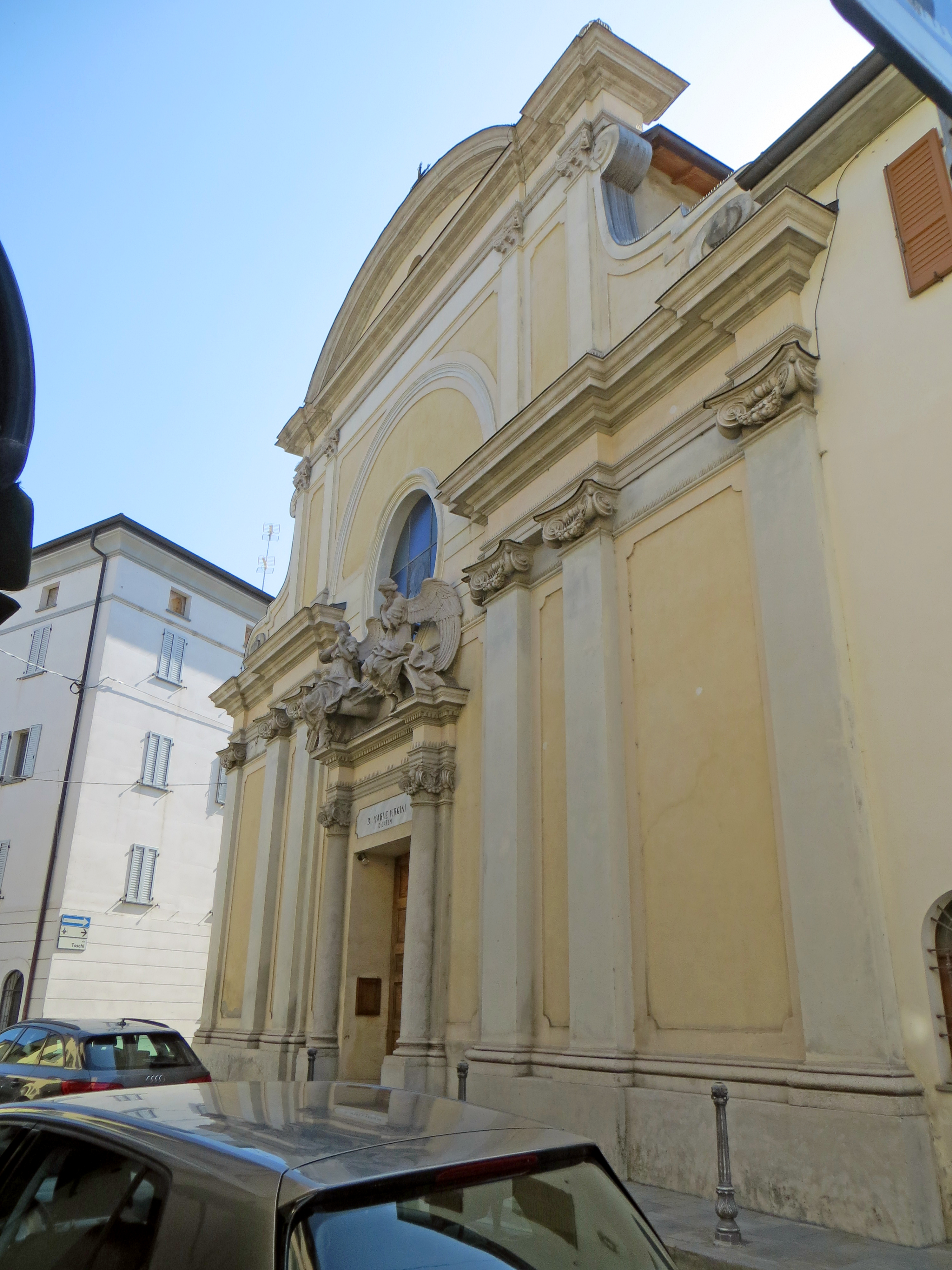 Chiesa dell'Annunciazione di Maria Vergine (Langhirano) - facciata